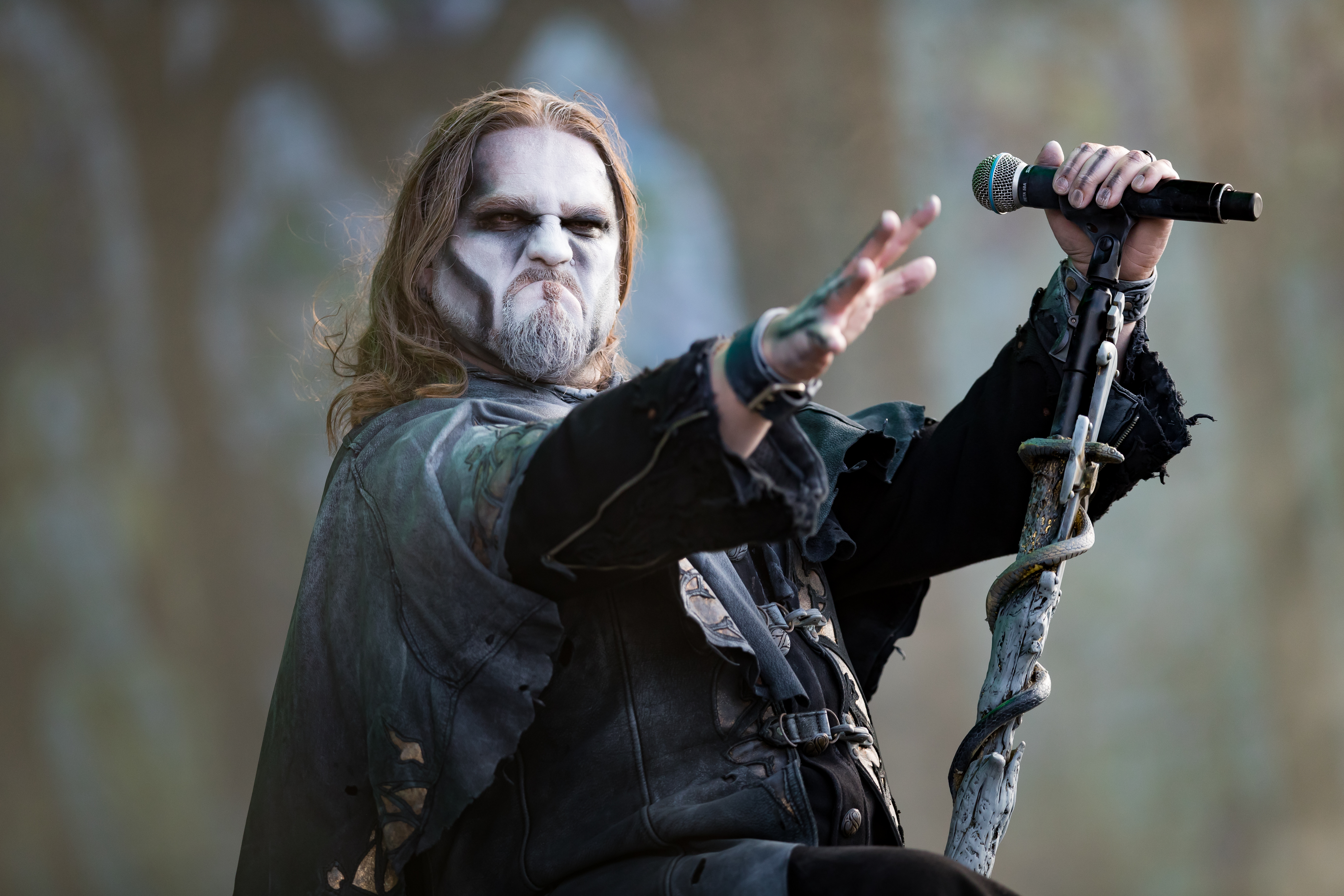 Powerwolf during Wacken Open Air at Schleswig-Holstein, Wacken, , Germany on 2017-08-05, Photo: Sven Mandel